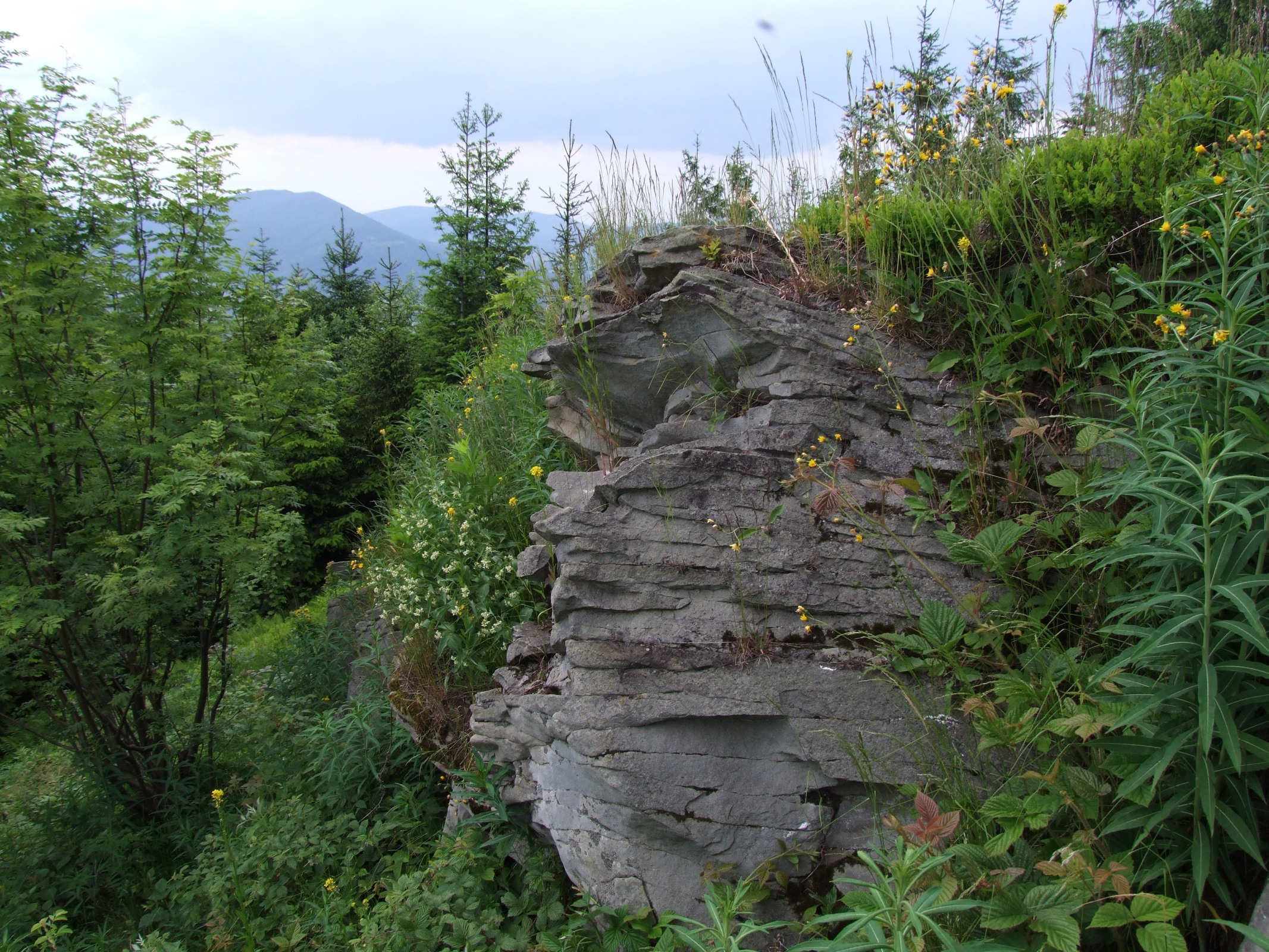 Wychodnia skalna na szczycie Łopienia (Beskid Wyspowy)